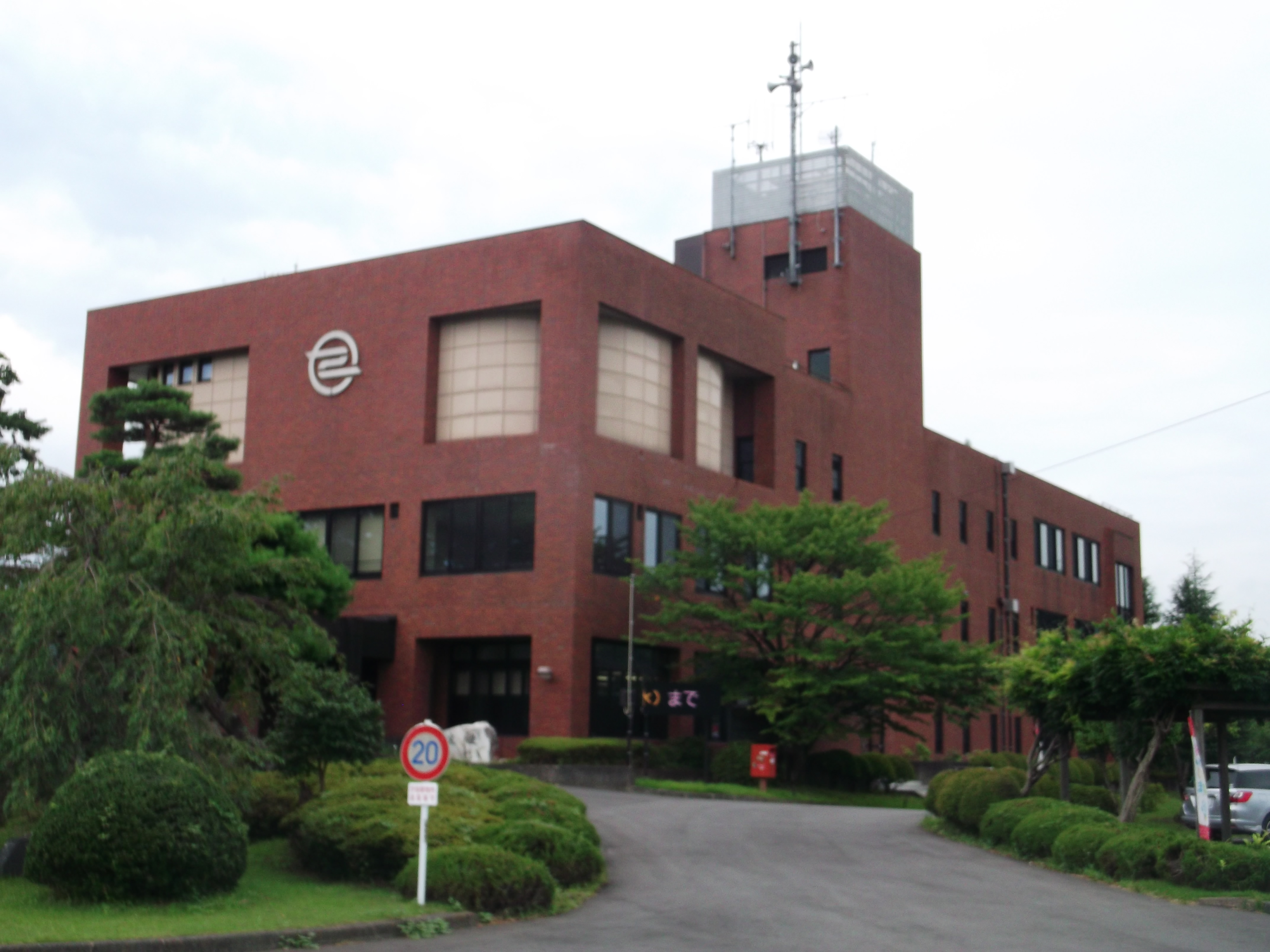 福島県東白川郡棚倉町役場